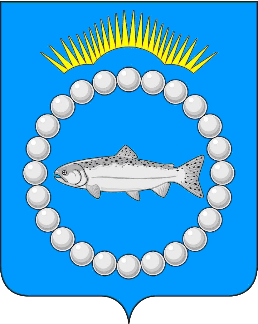 Герб Терского района, Мурманская область